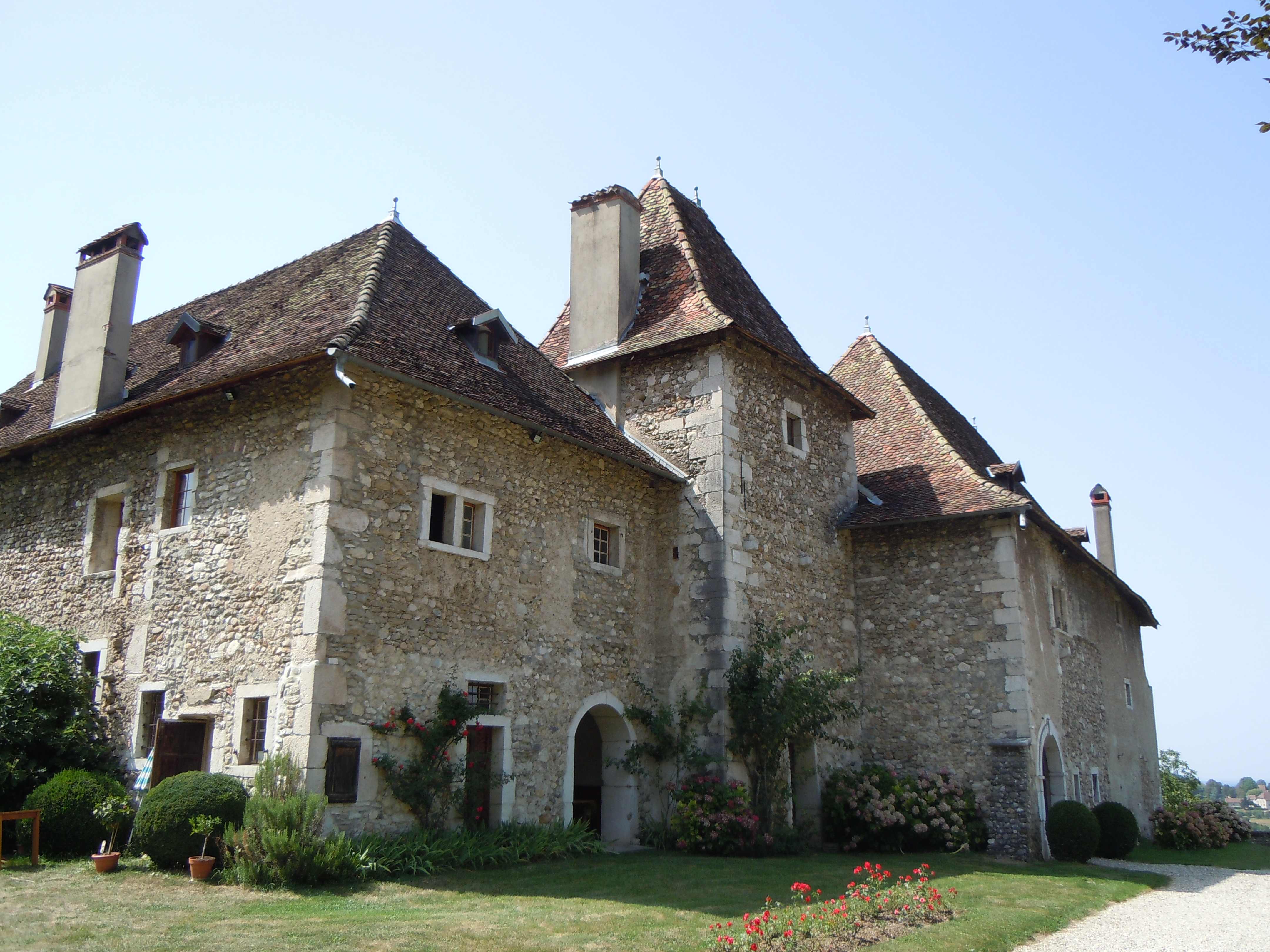 Chateau de Voissant - Isère